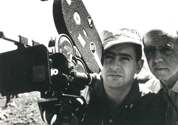 El cineasta boliviano Jorge Ruiz con Willard Dyke durante la filmación de "Y fueron libres" (1958)